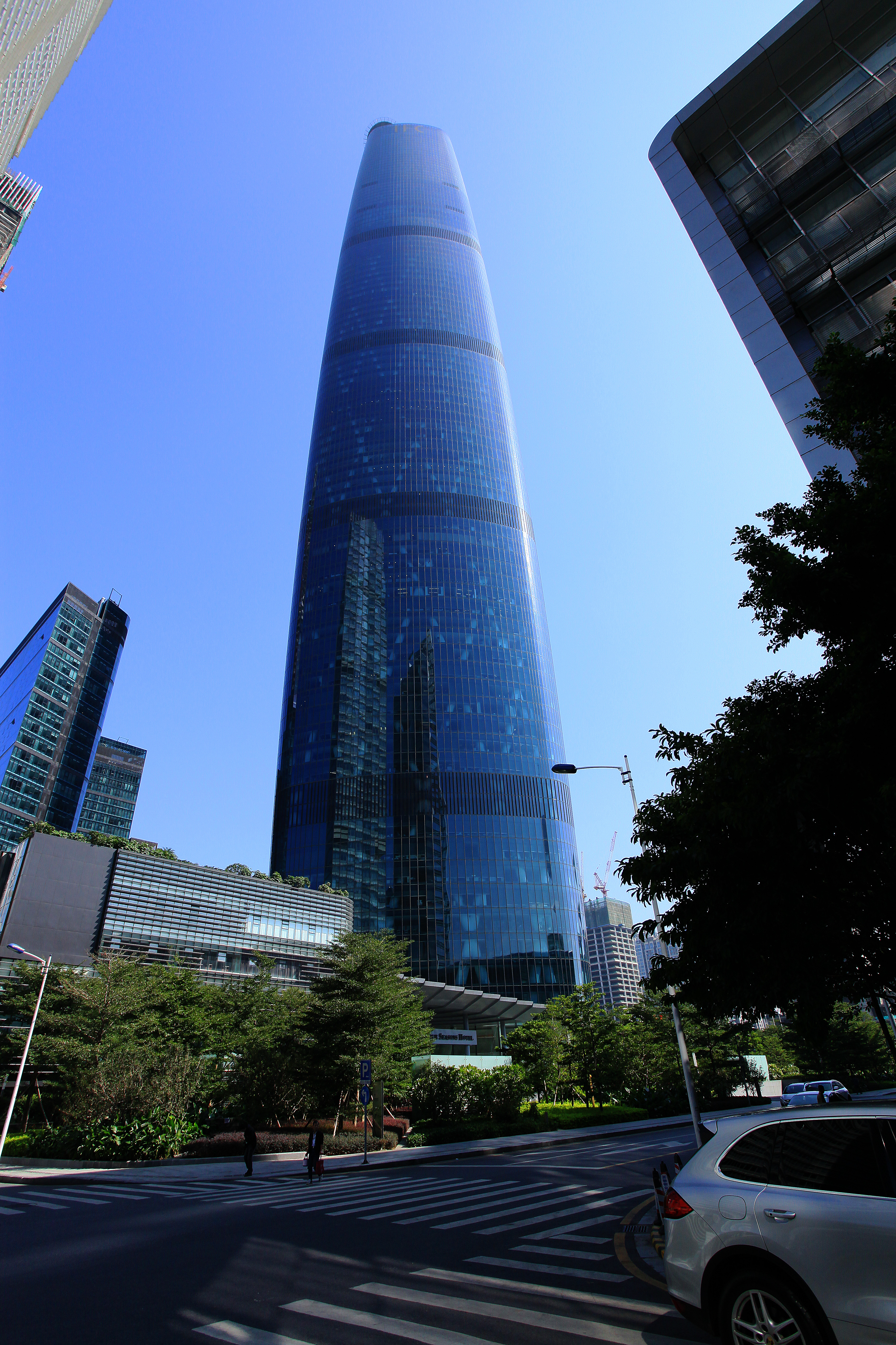 广州西塔 ; 广州四季酒店（70-100层）全景